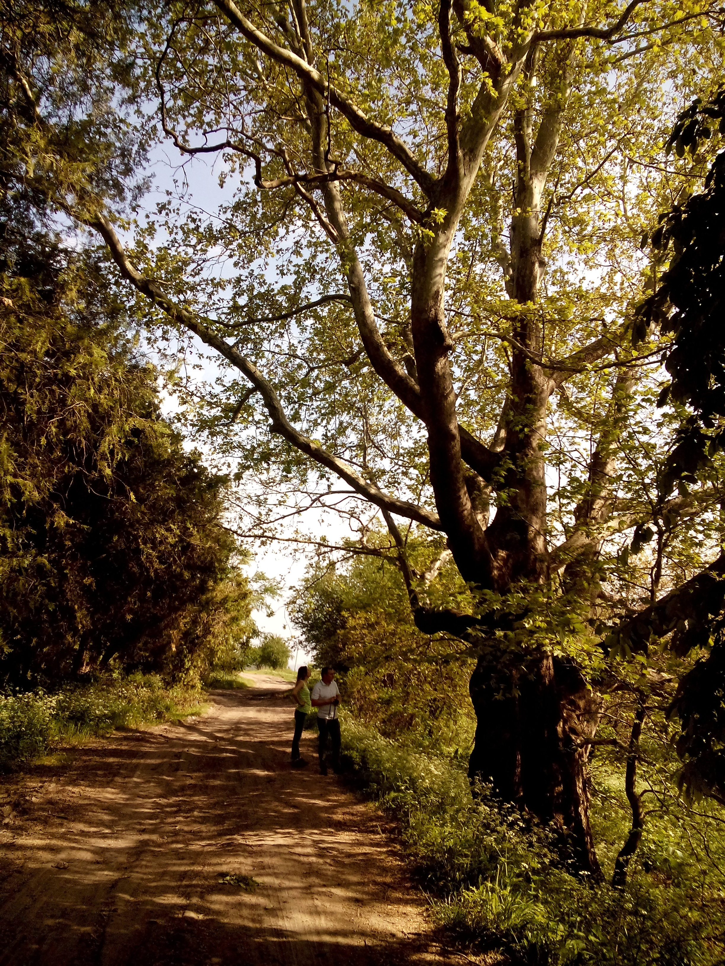 Platan occidental, monument al naturii amplasat în raionul Călărași, fostul conac moșieresc, satul Păulești (cod MD-CL-mn.Cb-041) Cb-041